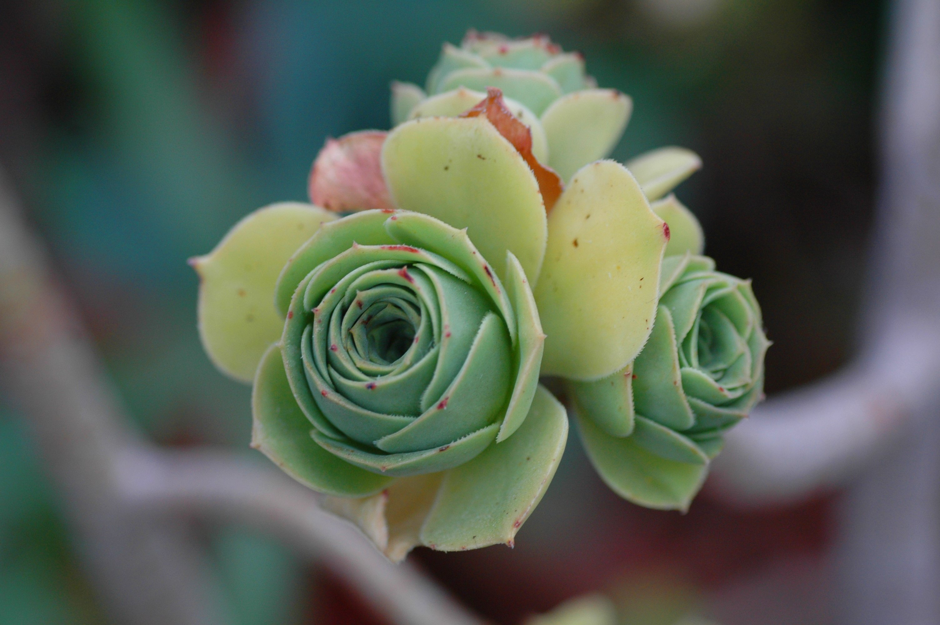 Aeonium balsamiferum (Balsam-Aeonie)